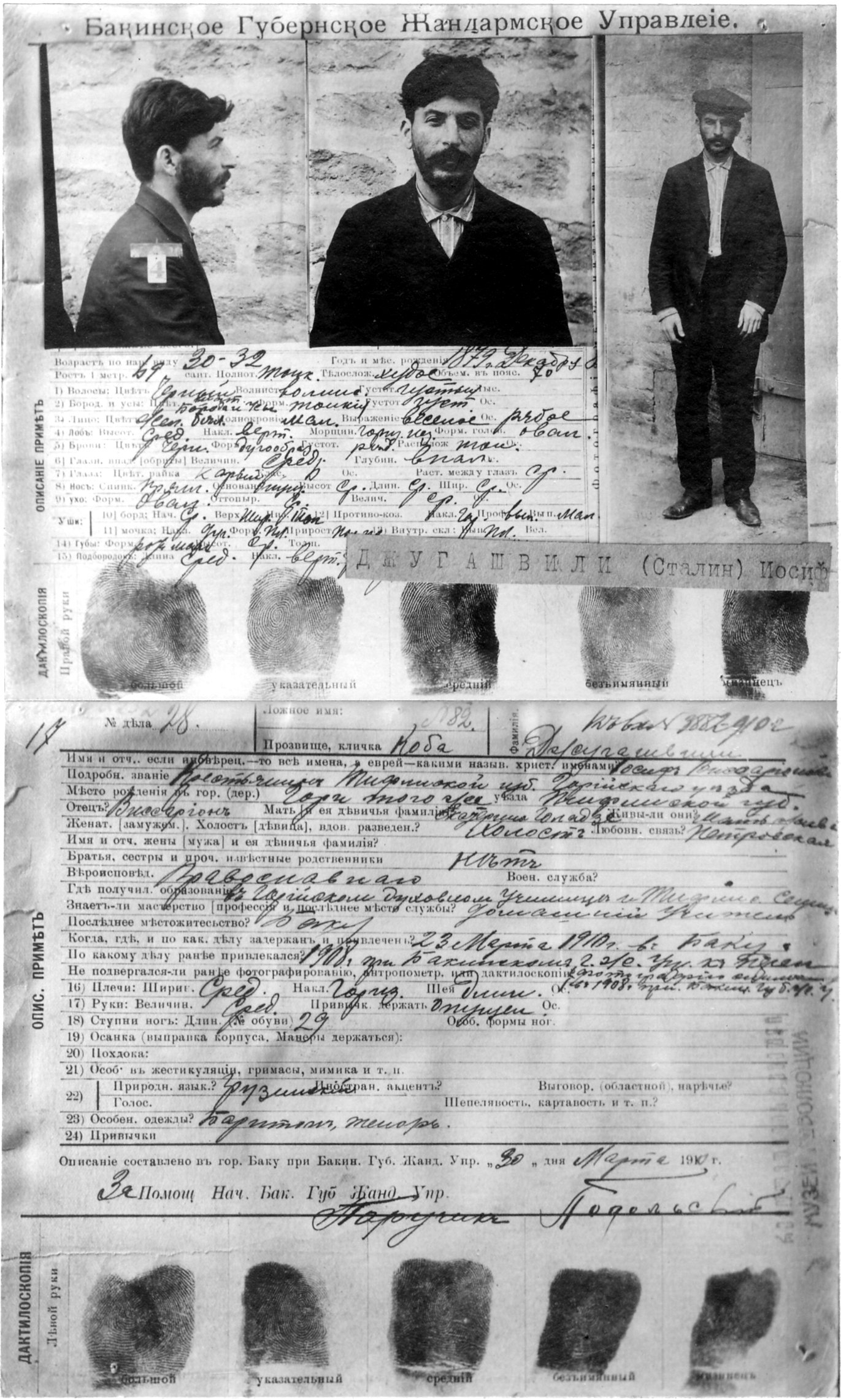 Ficha policial de Stalin con fotografías tomadas en Bakú en 1910.